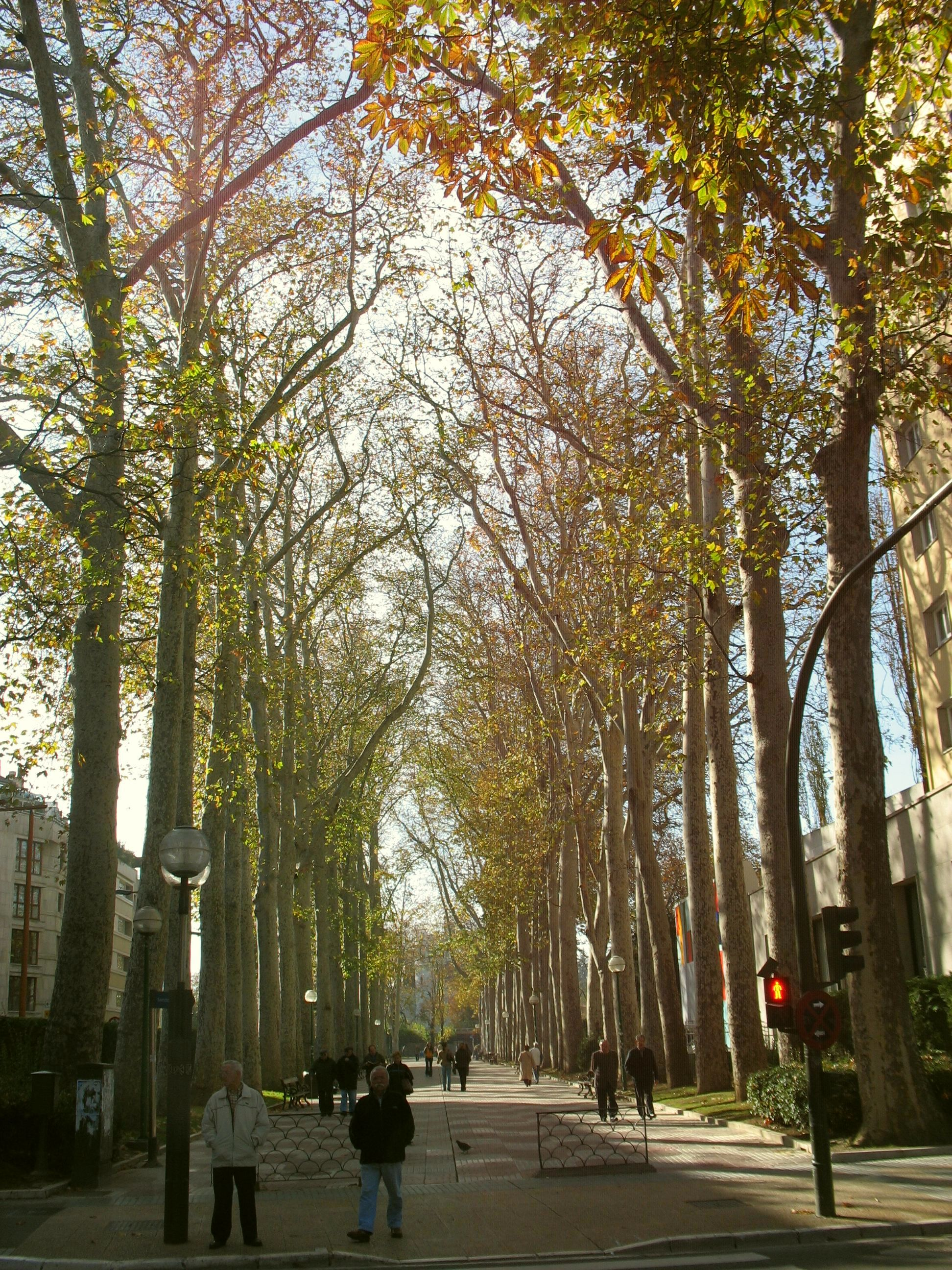 Paseo de la Senda, Vitoria-Gasteiz (Spain).